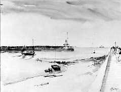 Drawing; Drawings